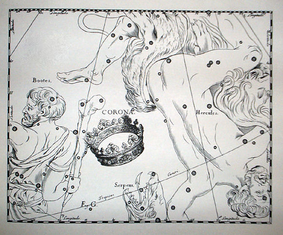 Tavola rappresentante la costellazione della Corona Boreale nel Firmamentum Sobiescianum, sive uranographia contenuto nel Prodromus Astronomiae